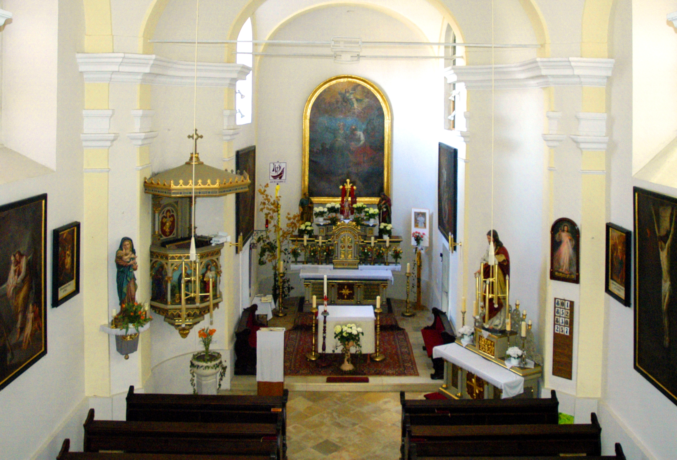 Kath. Pfarrkirche, hll. Peter und Paul